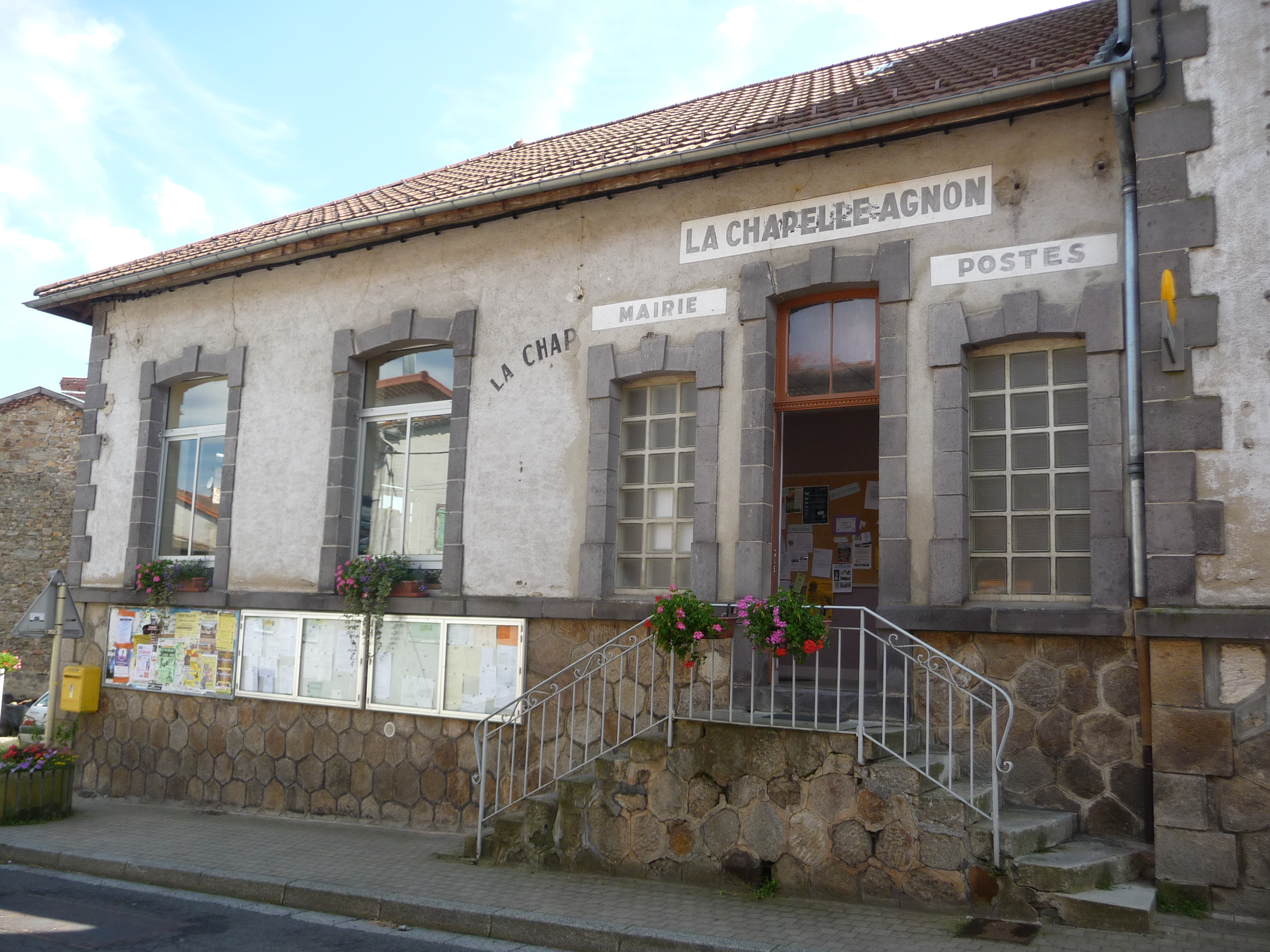 Mairie de La Chapelle-Agnon.